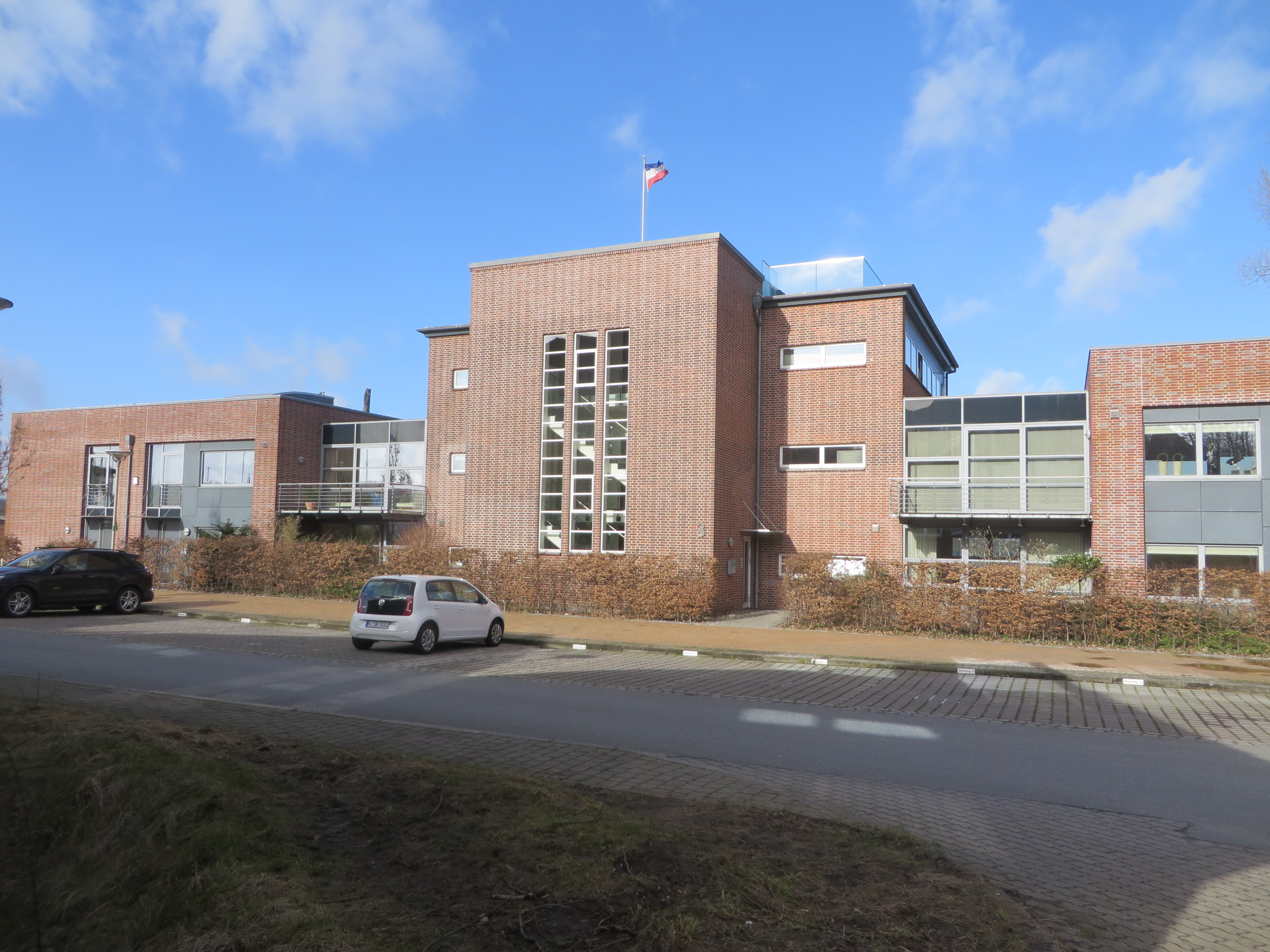 Kapitänshaus Sonwik (Flensburg-Mürwik 22 Februar 2017), Bild 04